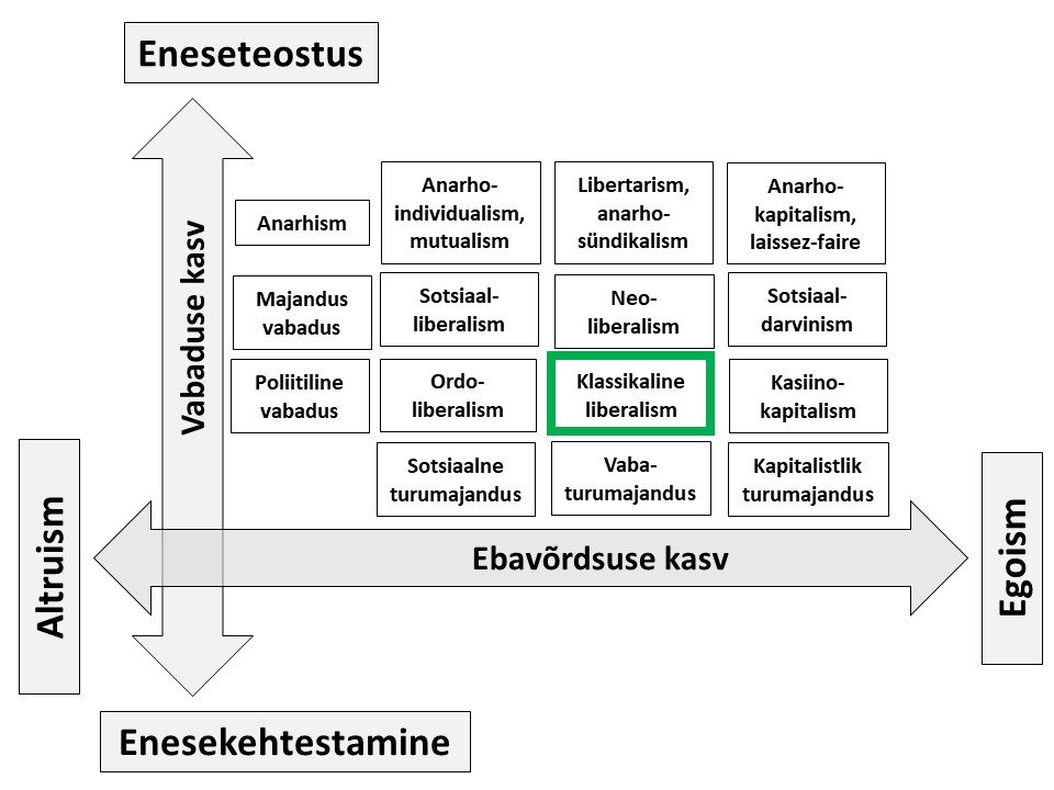 Klassikaline liberalism sotsiaalse korra mudelis